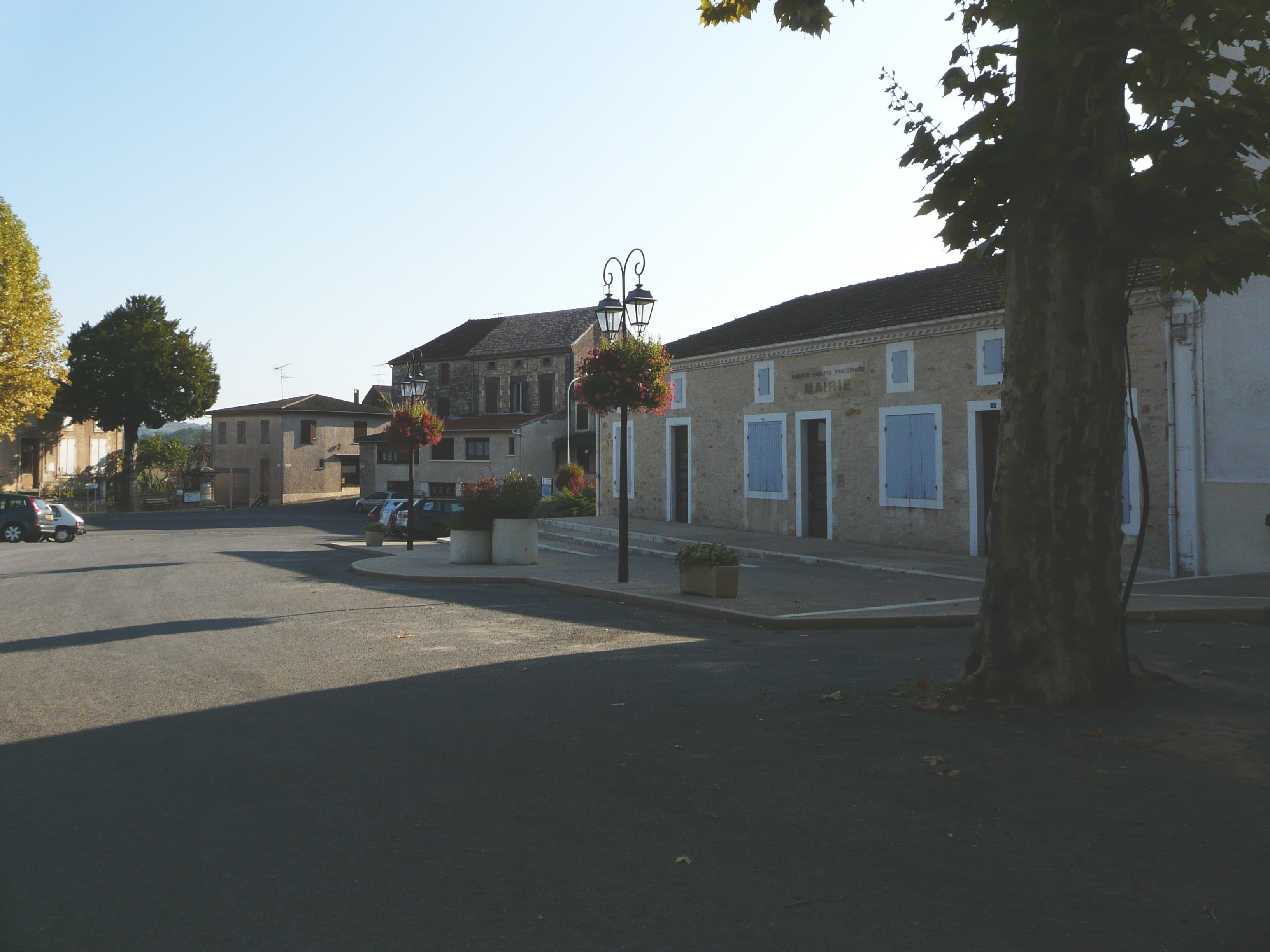 Mairie Monsempron-Libos